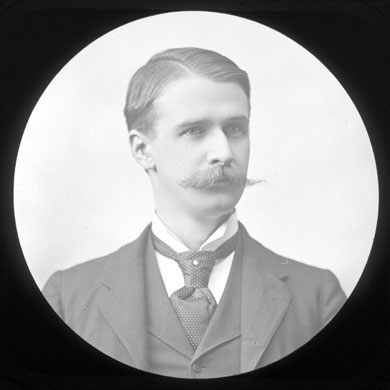 Orin Clarkson Baker